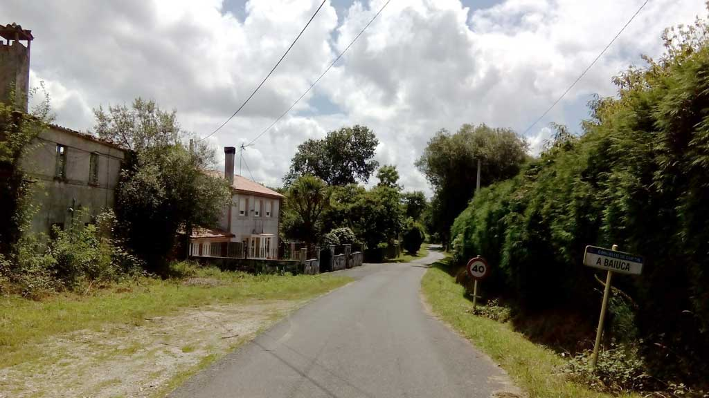 Vista da Baiuca, Curtis.